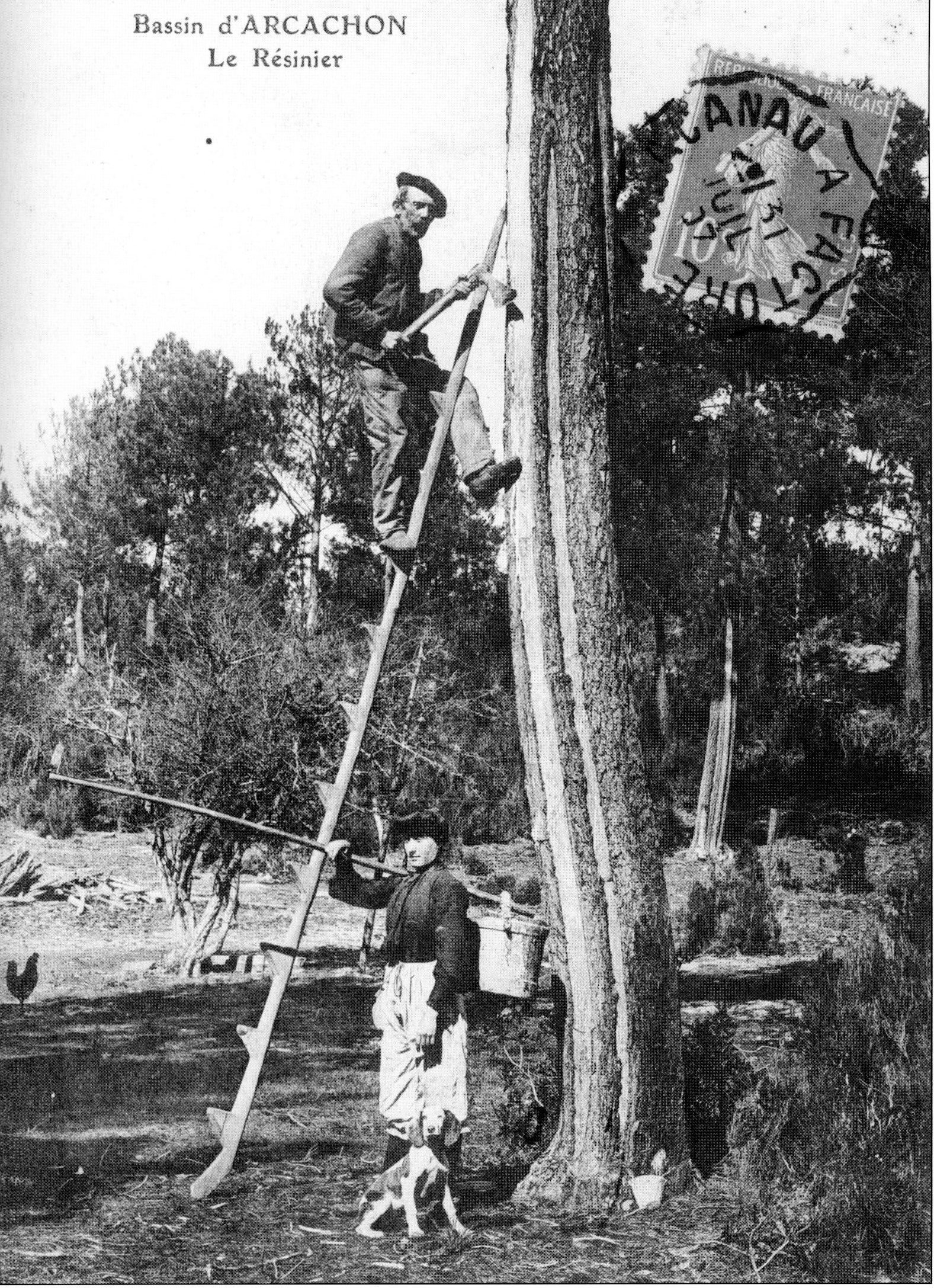 Un gemmeur sur son Pitey en 1907 en Pays de Buch Catégorie:Landes de Gascogne Catégorie:Pays de Buch